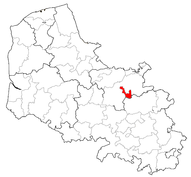 Localisation de la CCNE dans le Pas-de-Calais